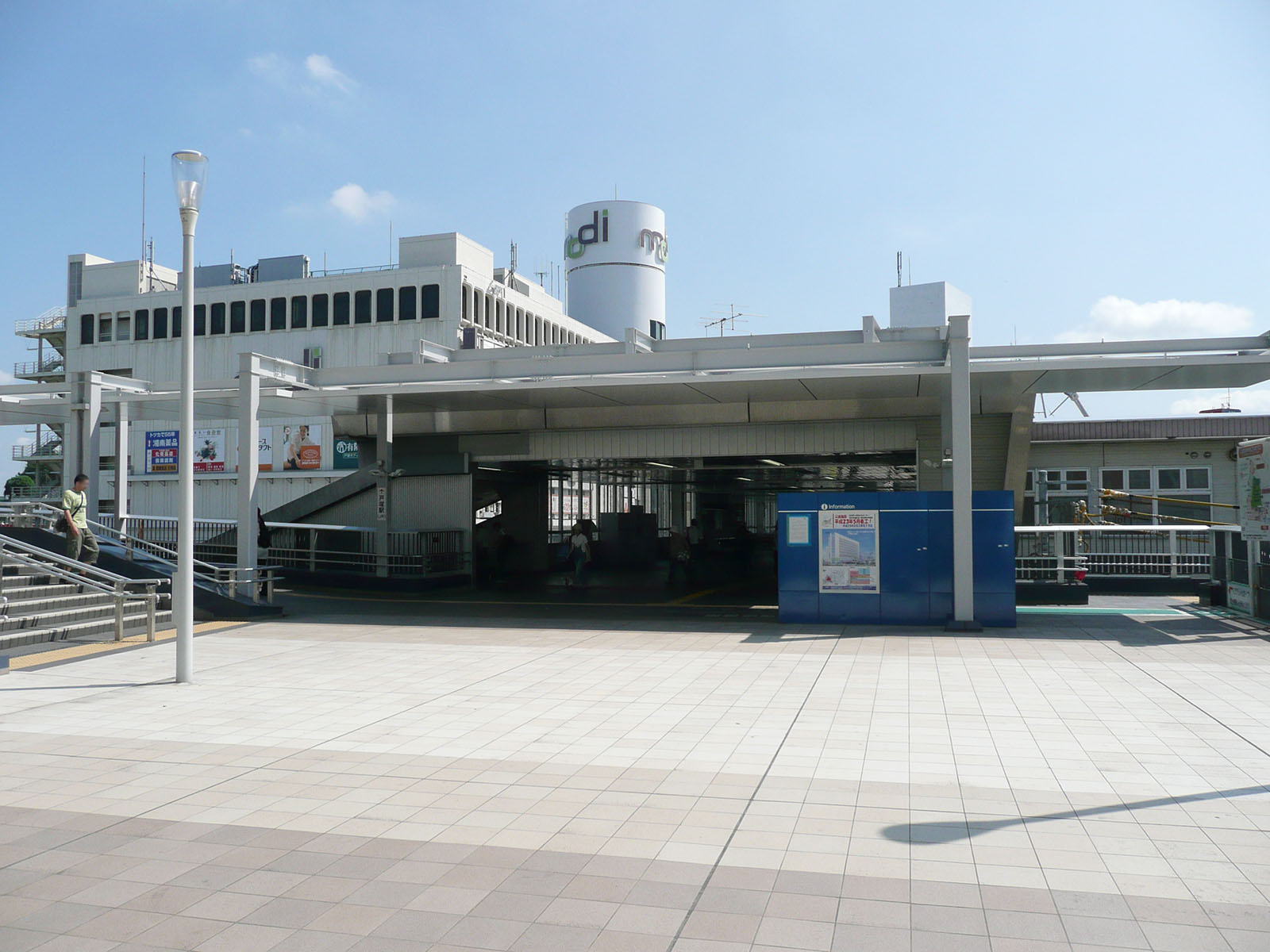 戸塚駅西口